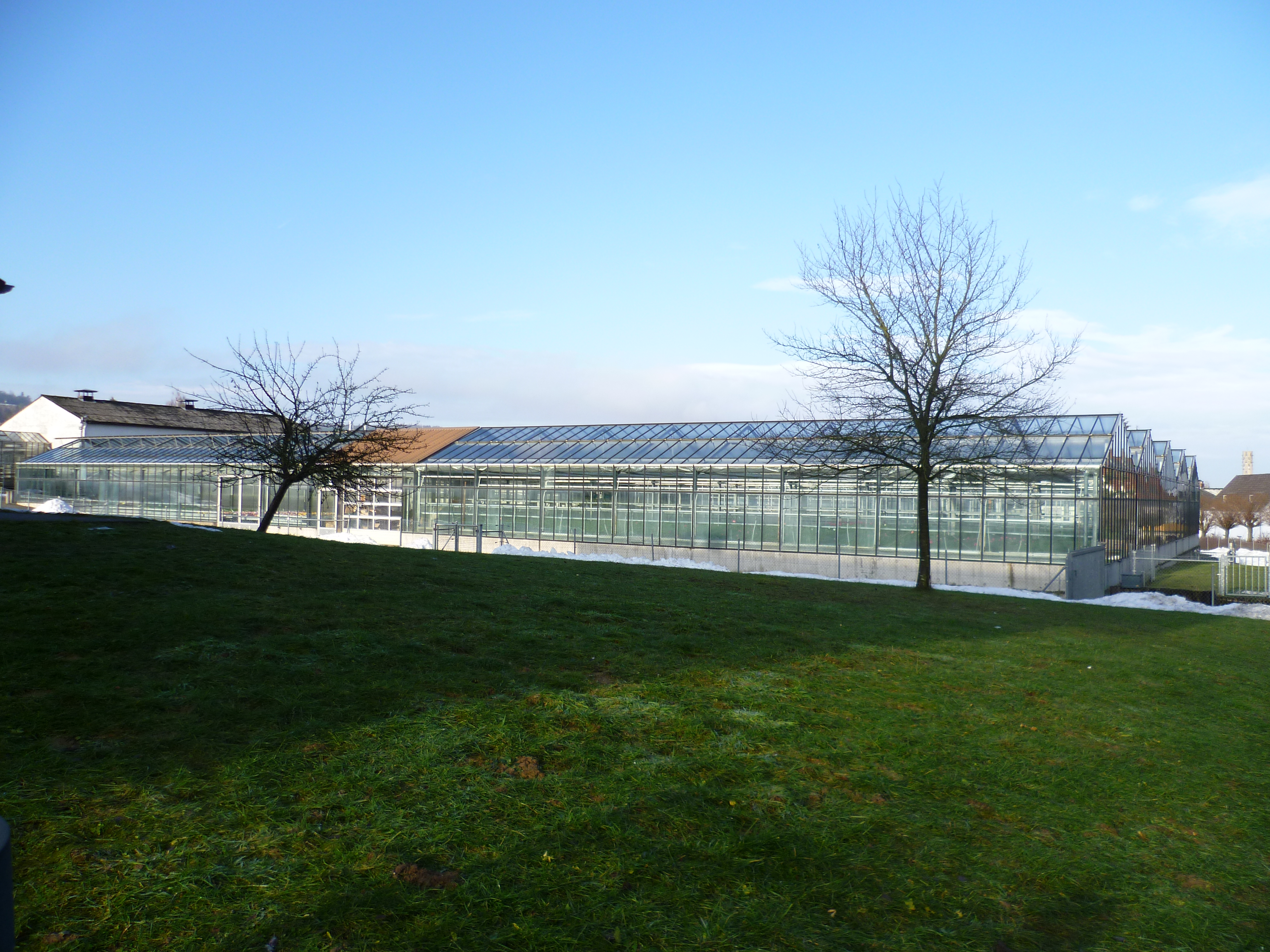 Die Gärtnerei des Kalmenhofs in Idstein